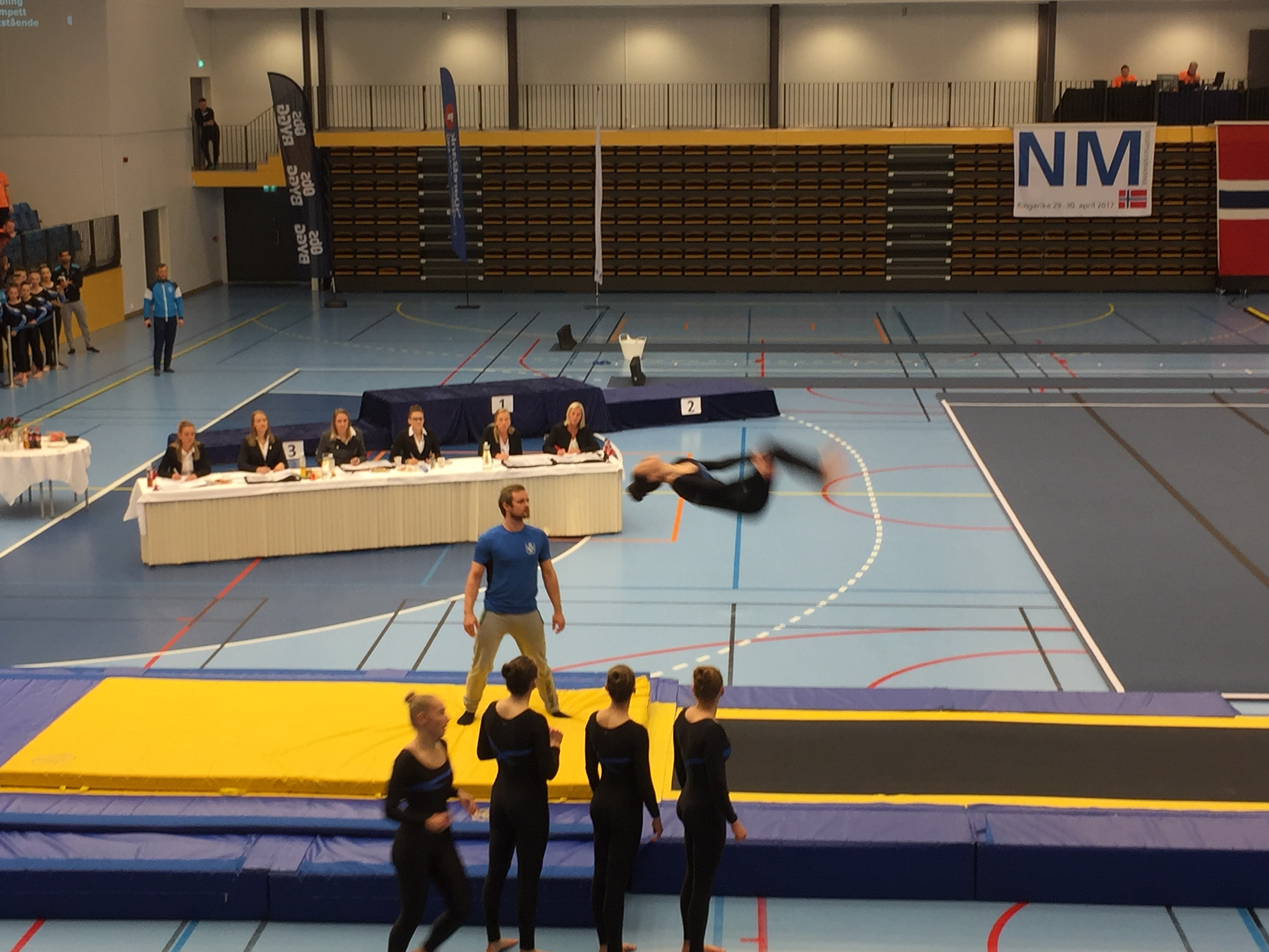 J-NM troppsturn 2017 Ringerike - Oslo Turn 1 - tumbling